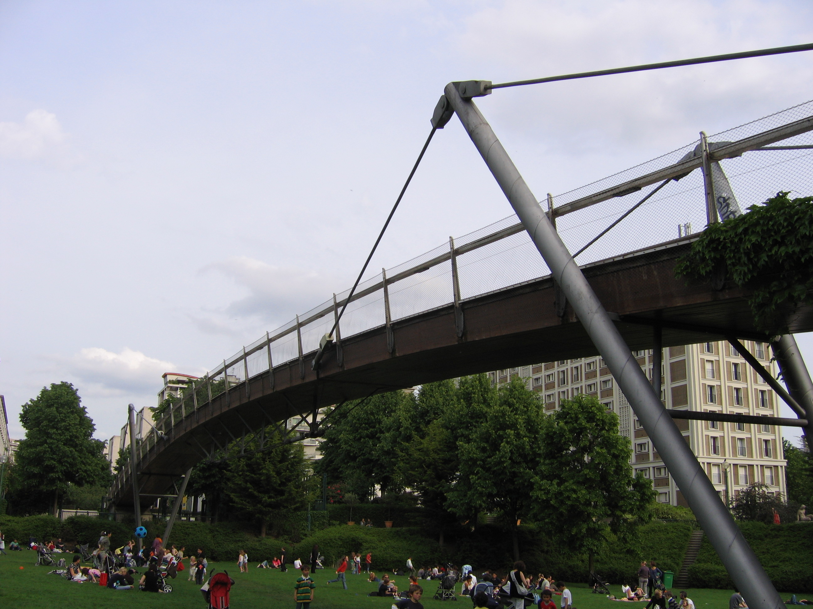 Passerelle BZ/12 située dans le jardin de Reuilly, Paris.